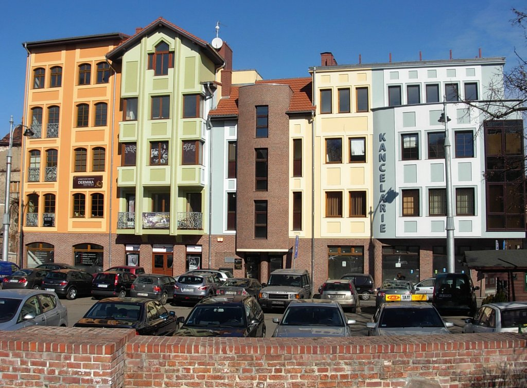 Wzniesione w latach 2007-2009 kamienice przy ul. Pod Blankami w Bydgoszczy